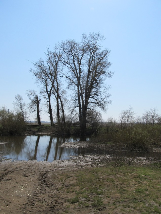 река Кидыш в районе одноимённого села